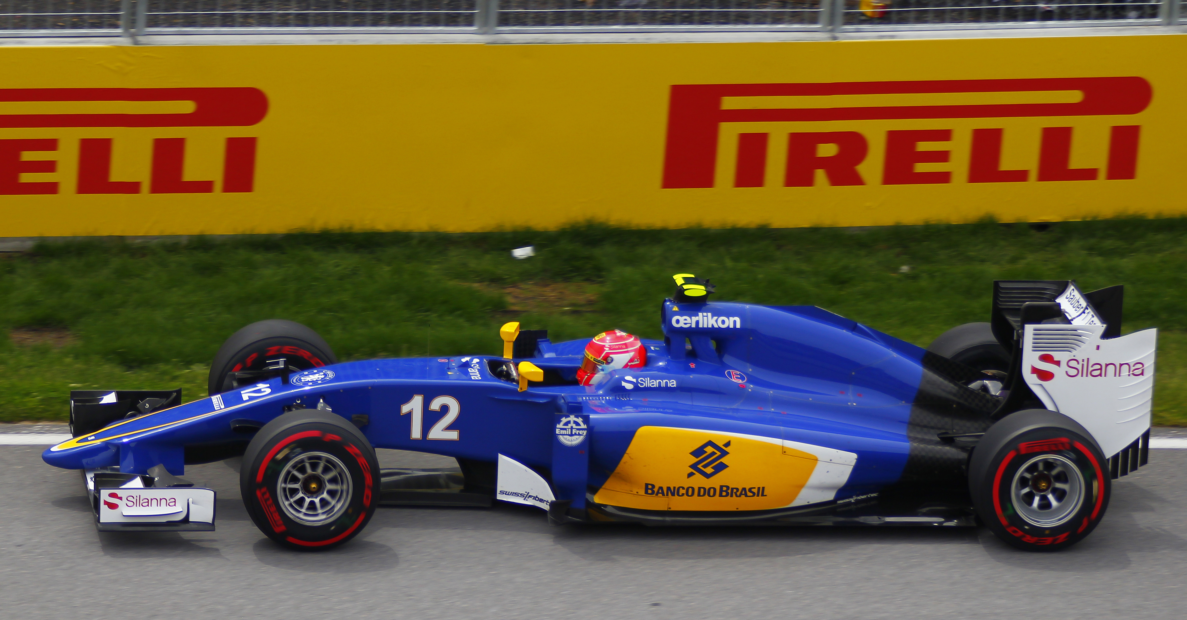 Felipe Nasr - Sauber - Grand Prix du Canada - Circuit Gilles-Villeneuve - 7 juin 2015 (Photo Paul-Émile Poulin-Jacques)